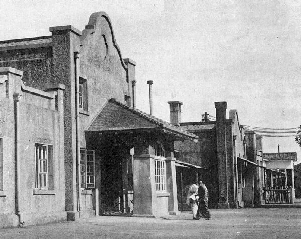 蘇家屯駅の美観中文（中国大陆）: 苏家屯站旧景